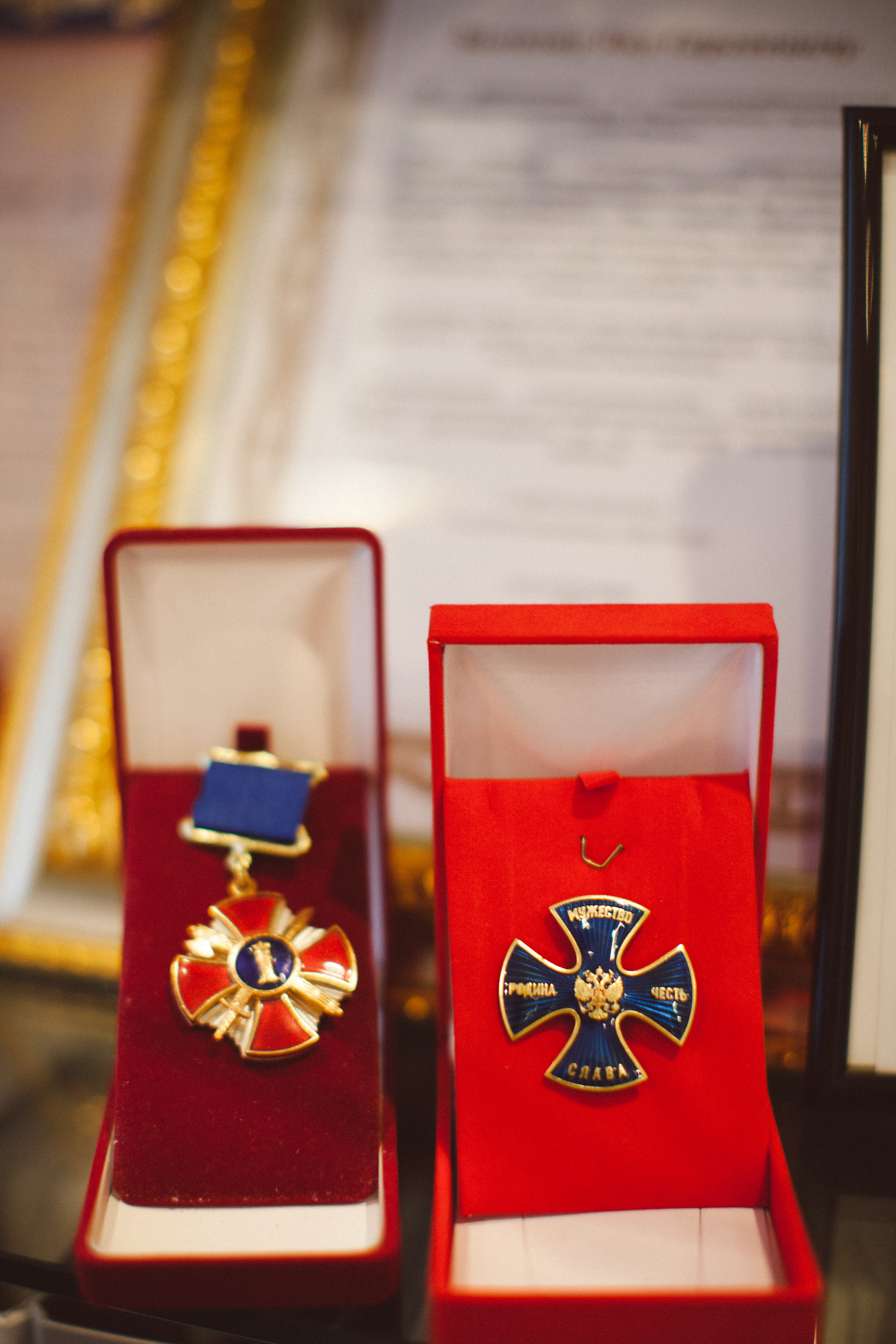 Никитин отмечен международными наградами